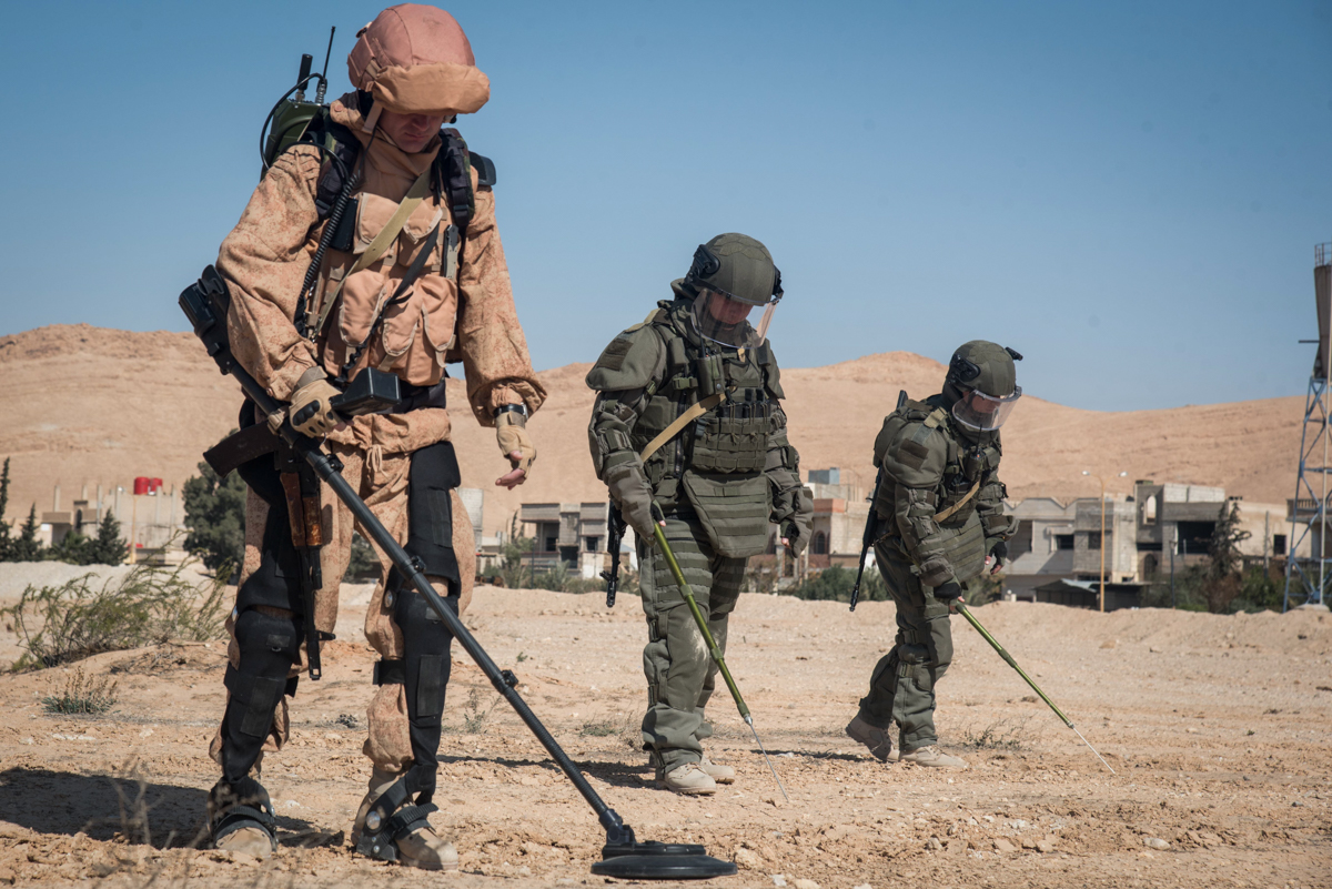 Использование военными инженерами МПЦ ВС РФ новейших инженерных средств при разминировании Пальмиры.